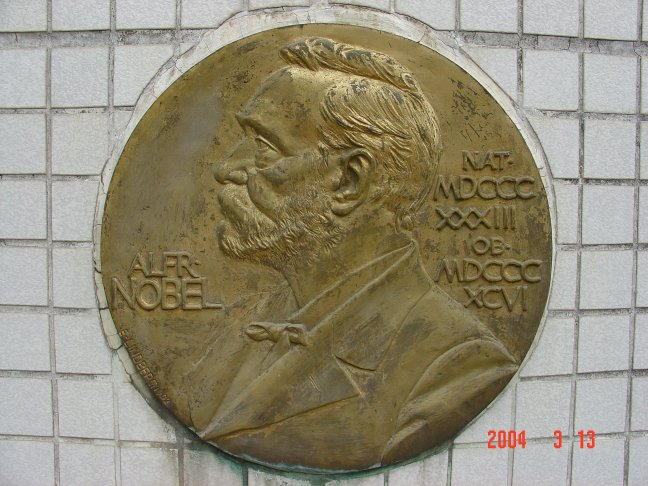 竹中諾貝爾獎牌近照，這是我自己拍的。